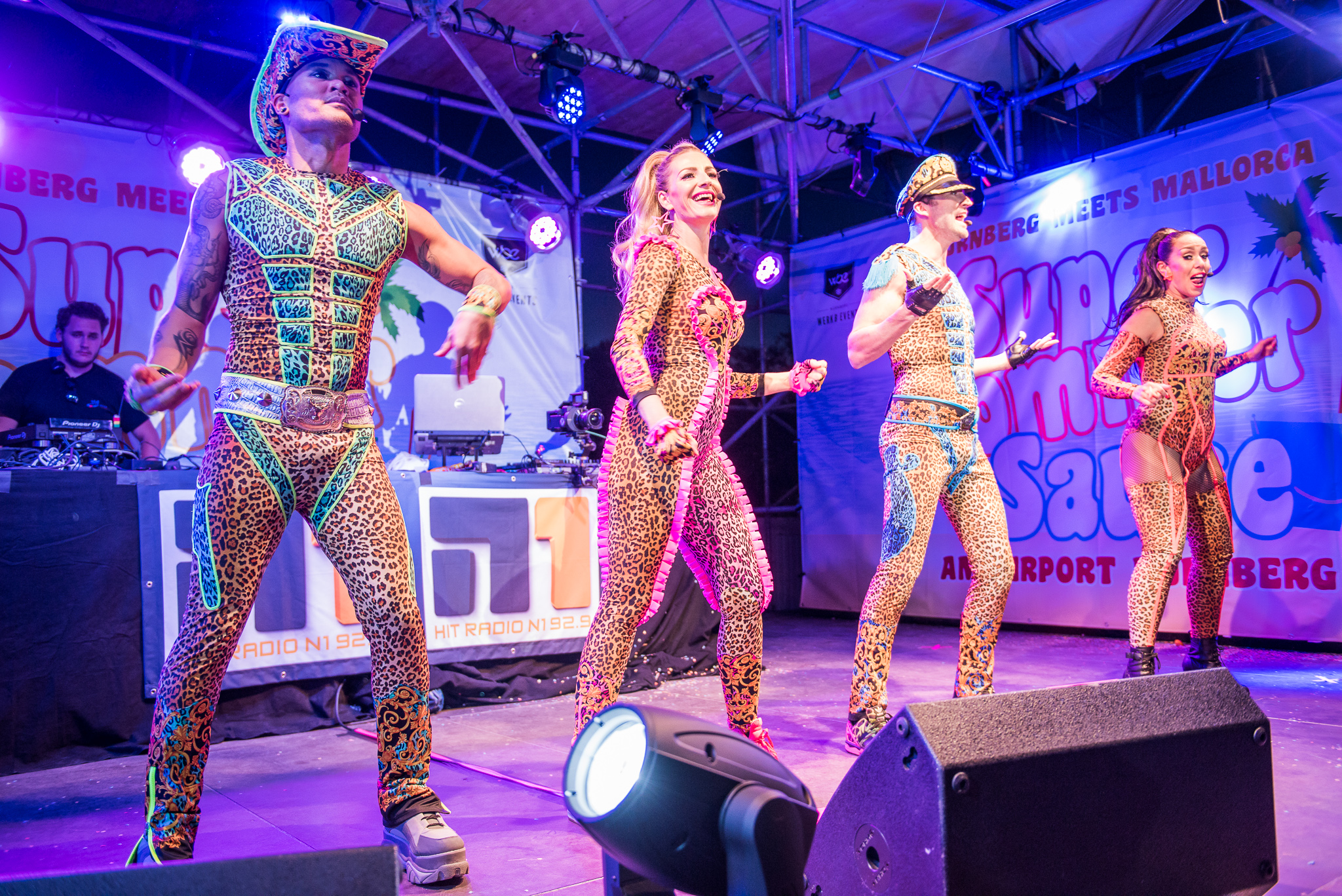 Denise Post-Van Rijswijk,Donny Latupeirissa,Kim Sasabone,Konzert,Livekonzert,Livemusik,Musik,Radio N1,Robin Pors,Super Sommer Sause 2016,Vengaboys,Werk B Events